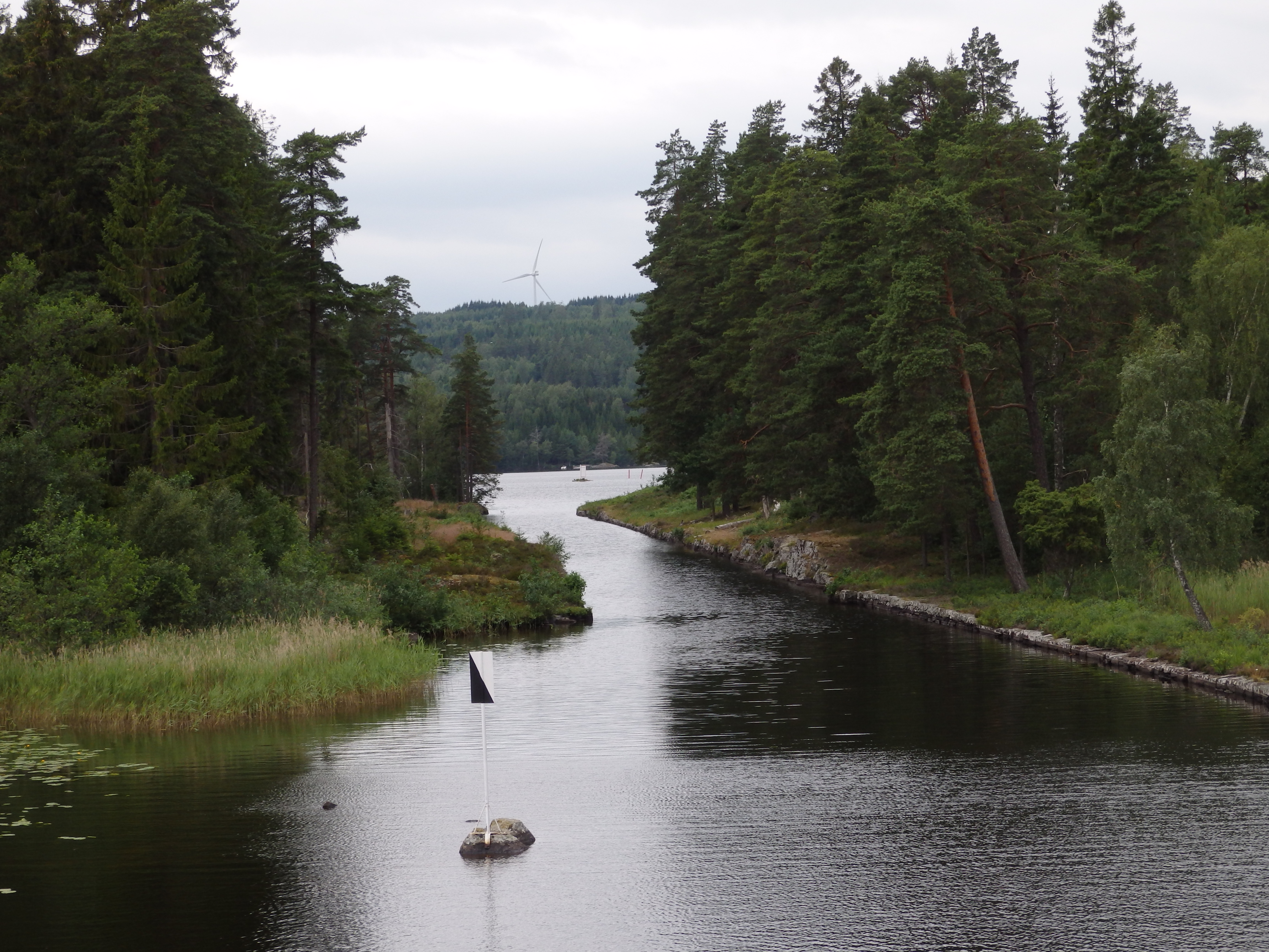 Spetsnäskanalen